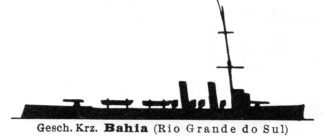 Brasilianischer Geschützter Kleiner Kreuzer BAHIA (1910-1945)